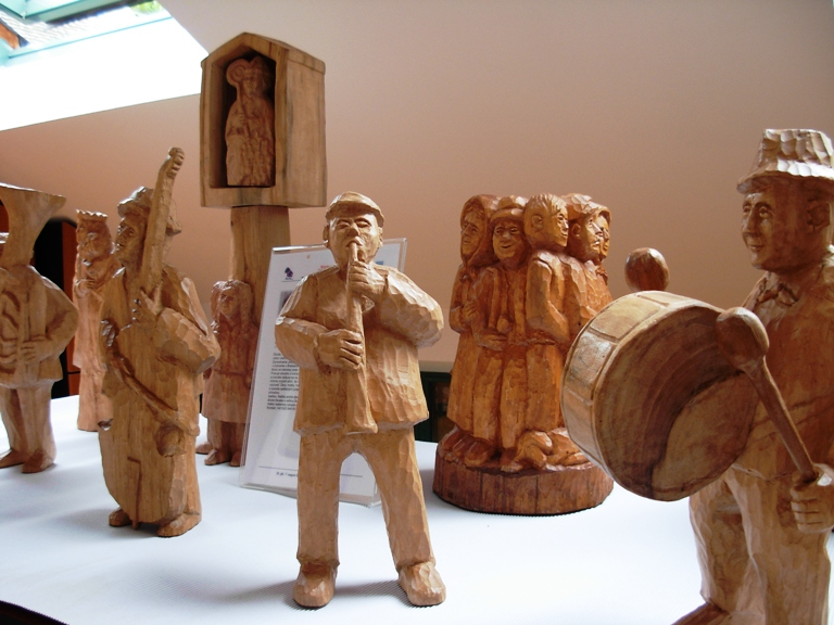 Galerija "Babka" iz Kovačice